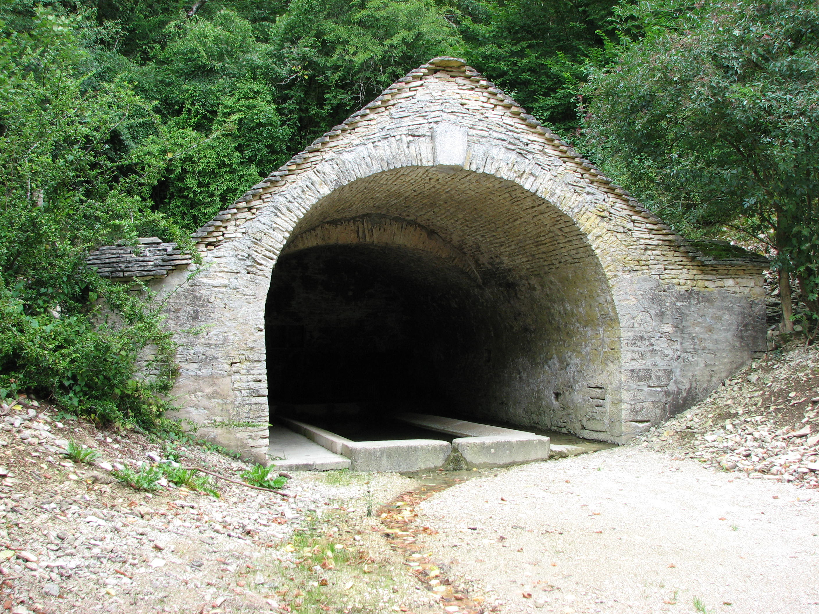 Pimelles, L'entrée vouté en pierres